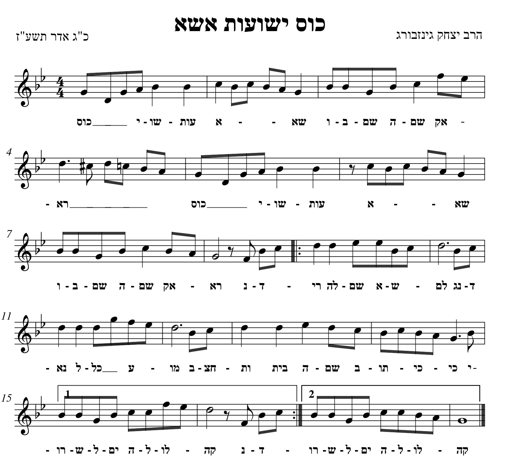 Musical notes